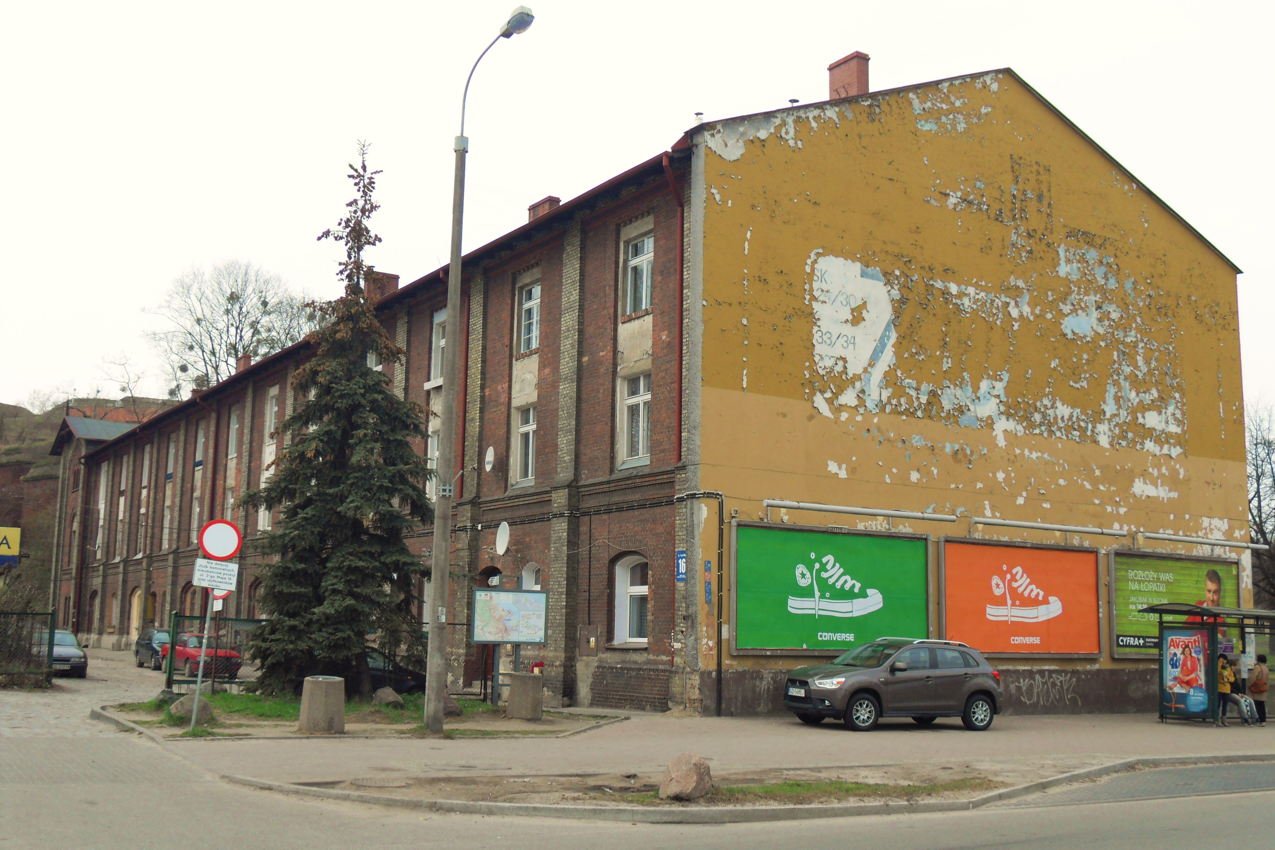 Gdańsk. Dawna zbrojownia w zespole umocnień nowożytnych przy ul. 3-go Maja 16.